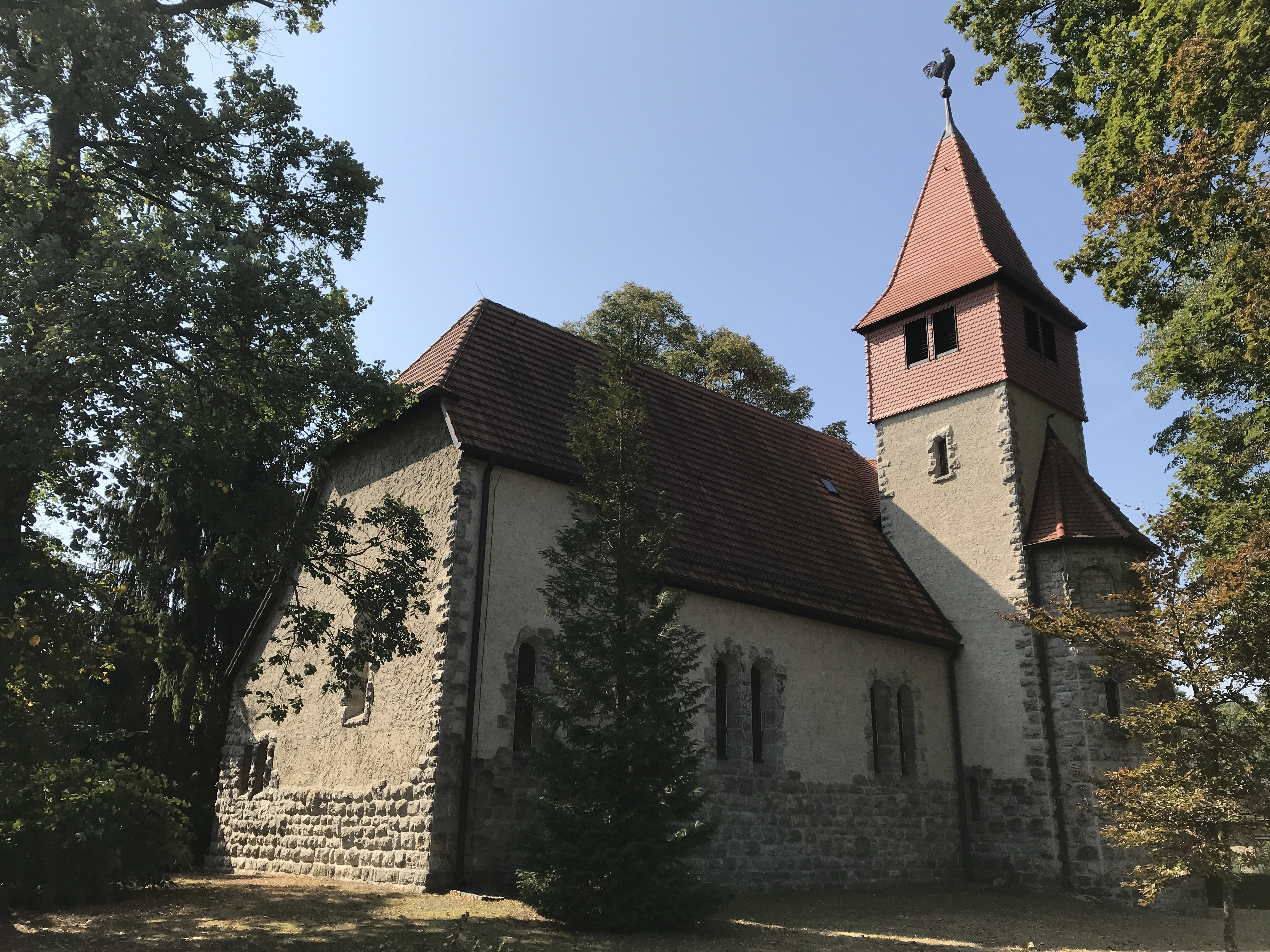 Die Dorfkirche in Kienbaum der Gemeinde Grünheide (Mark) in Brandenburg entstand in den Jahren 1908 und 1909. Im Innern steht unter anderem ein Kanzelaltar aus dem 18. Jahrhundert.